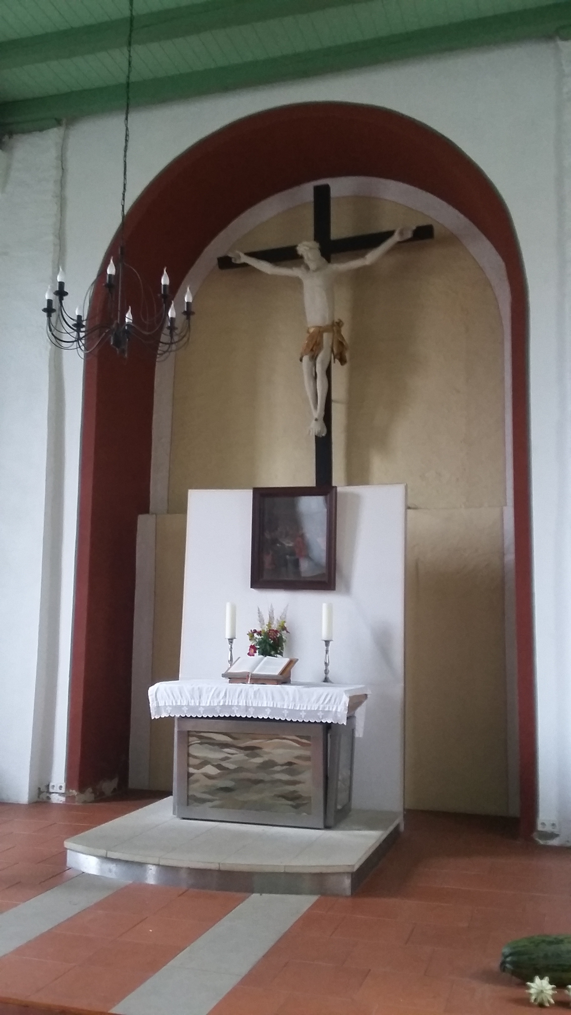 Der Welt-Erde-Altar der Friedenskirche Auerstedt